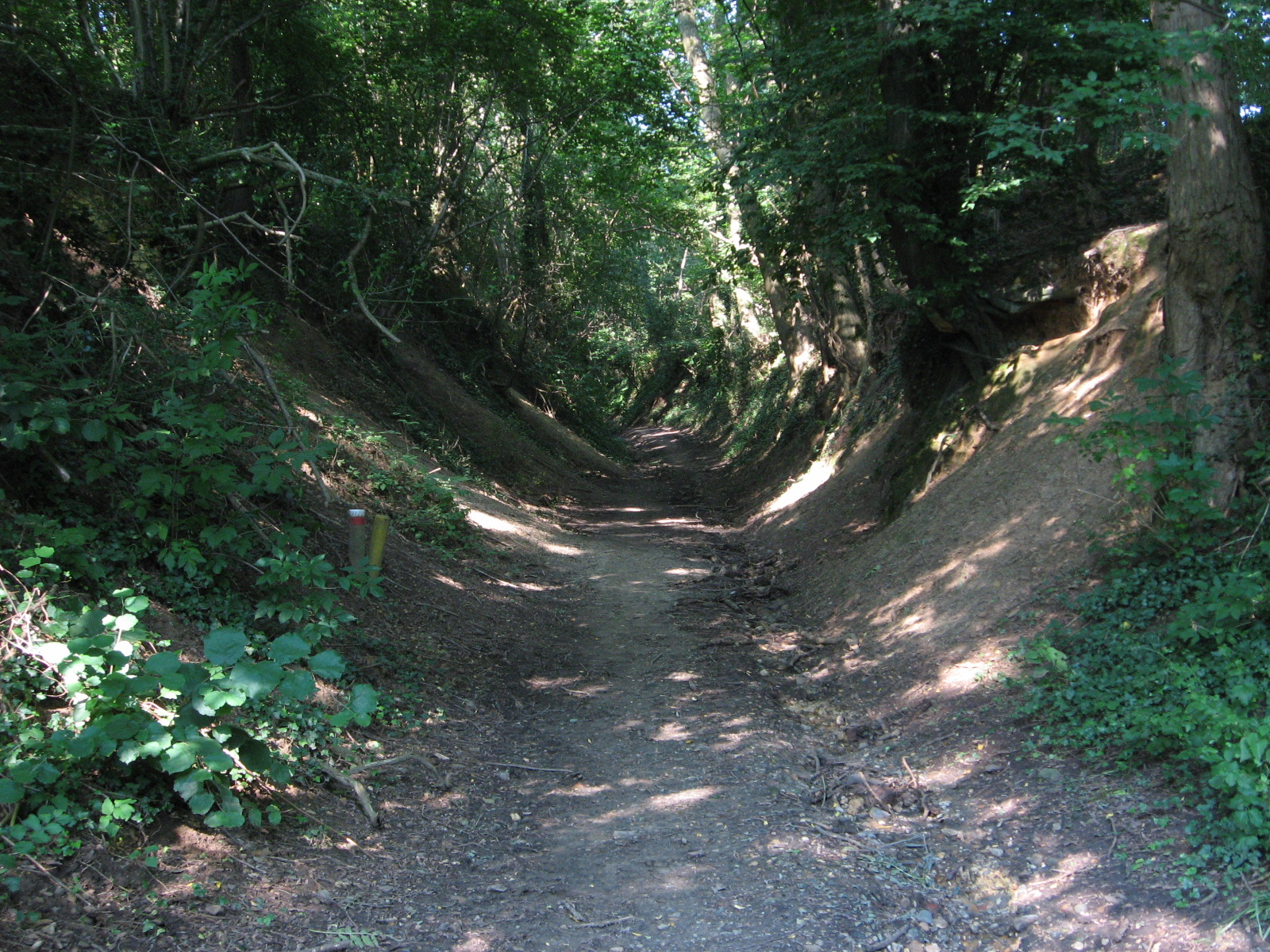 Holleweg bij Cadier en Keer (Zuid-Limburg). Deze metersdiepe weg is ontstaan door wegverkeer en wegspoelen van bermmateriaal